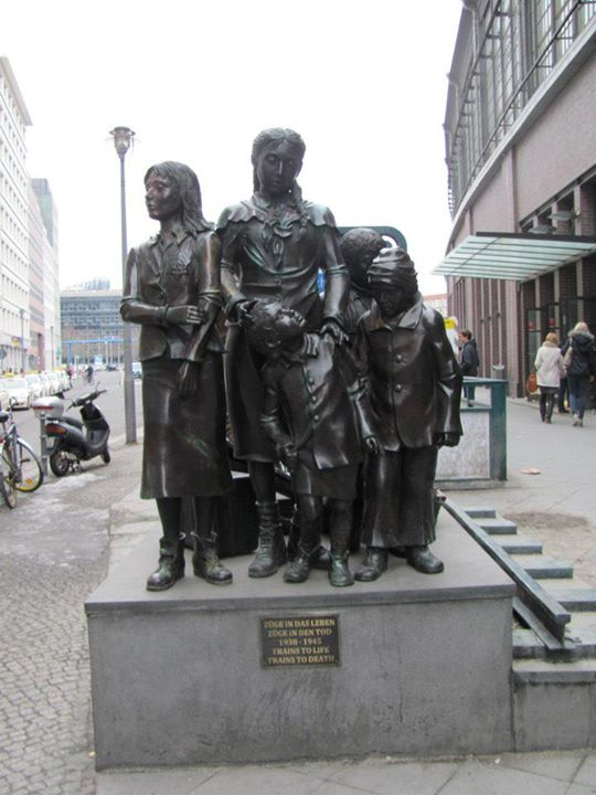 הרכבת למוות (2008) - "Trains to life - trains to death"